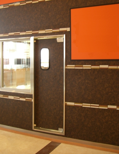 スイングドア姿絵